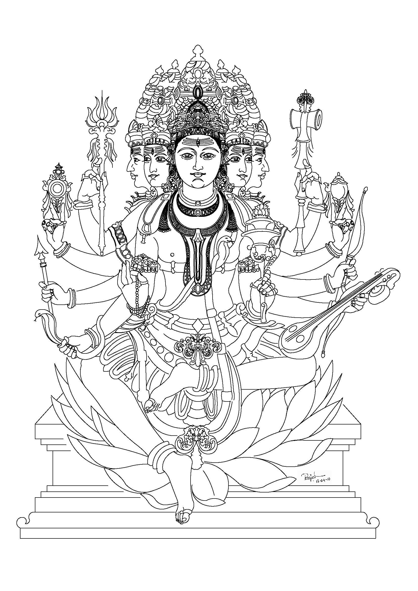 ശ്രീമദ് വിരാട് പഞ്ചമുഖ വിശ്വകർമ്മാവ്